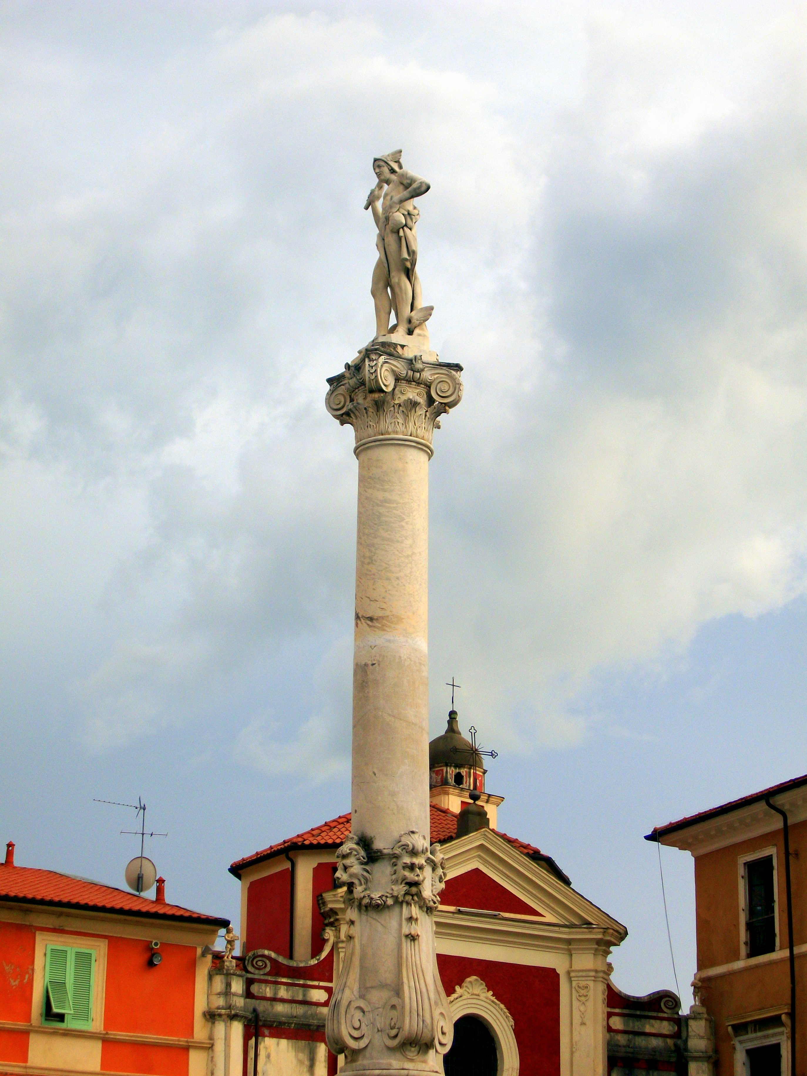 Massa, Piazza mercurio, statua di Hermes